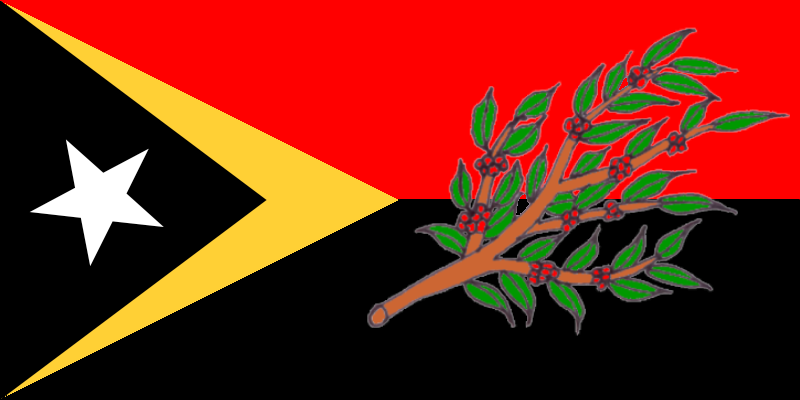 Bandeira do Ermera. Ermera é o centro da plantação de café do Timor Leste.. Os cinco ramos da planta do café representam os cinco subdistritos. Cada Suco é representado por um bago. O vermelho lembra o passado sangrento e adverte à Paz. Preto representa o café. Enquanto o sol nasce e ilumina o céu de vermelho, permanecem os vales ainda na escuridao nocturna.